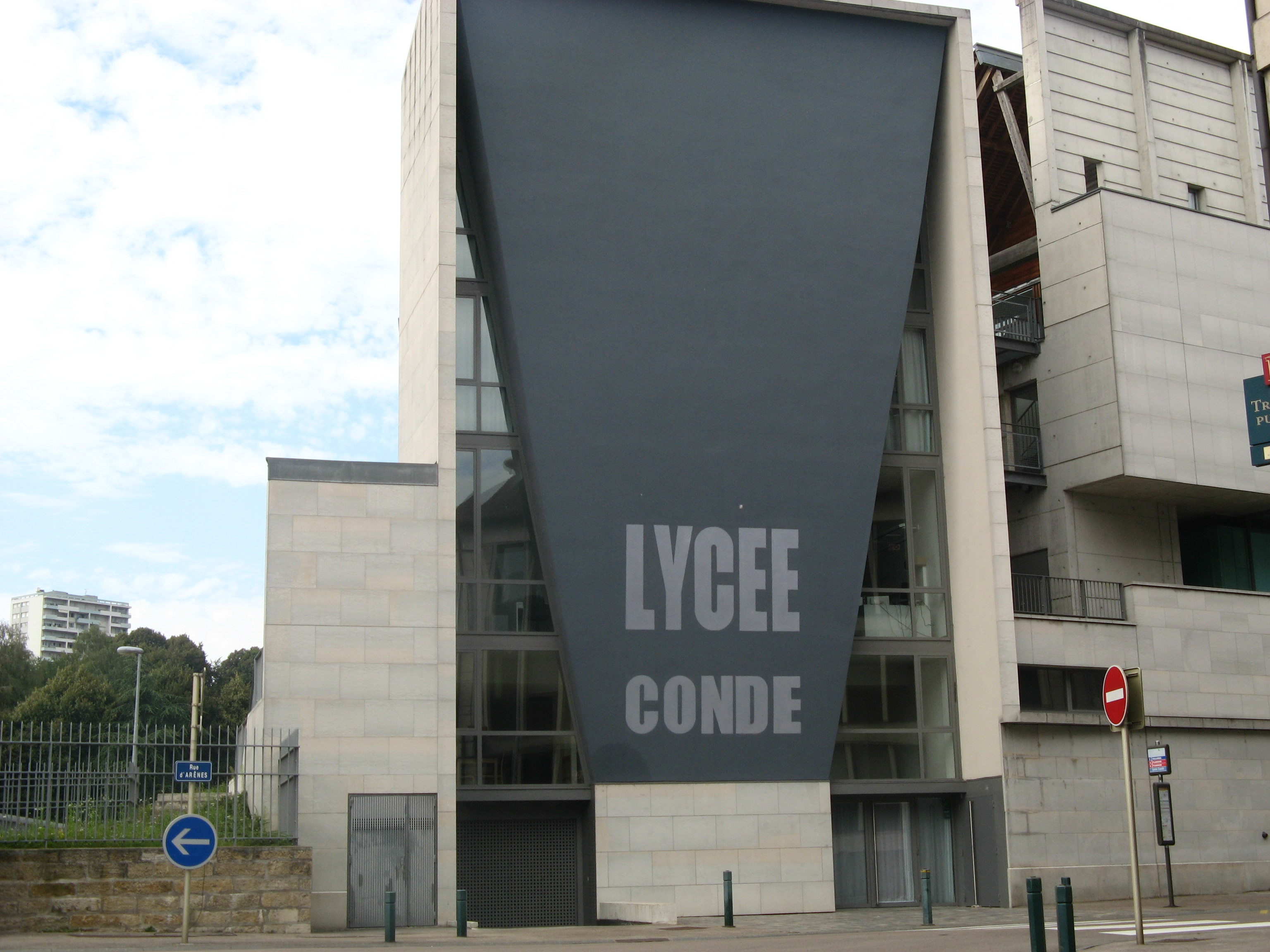 Lycée Condé à Besançon